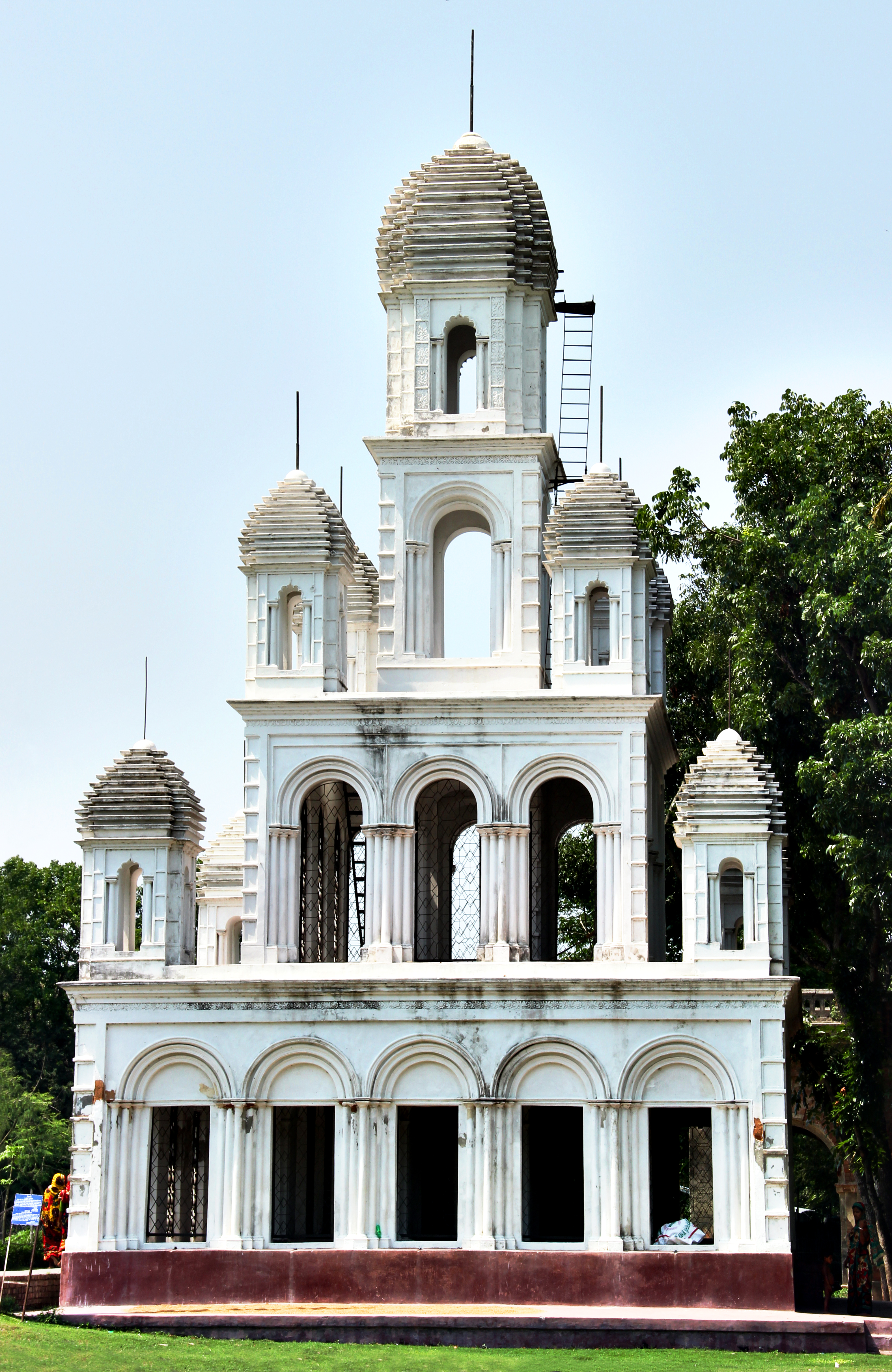 তেওতা জমিদার বাড়ীর দোলমঞ্চ